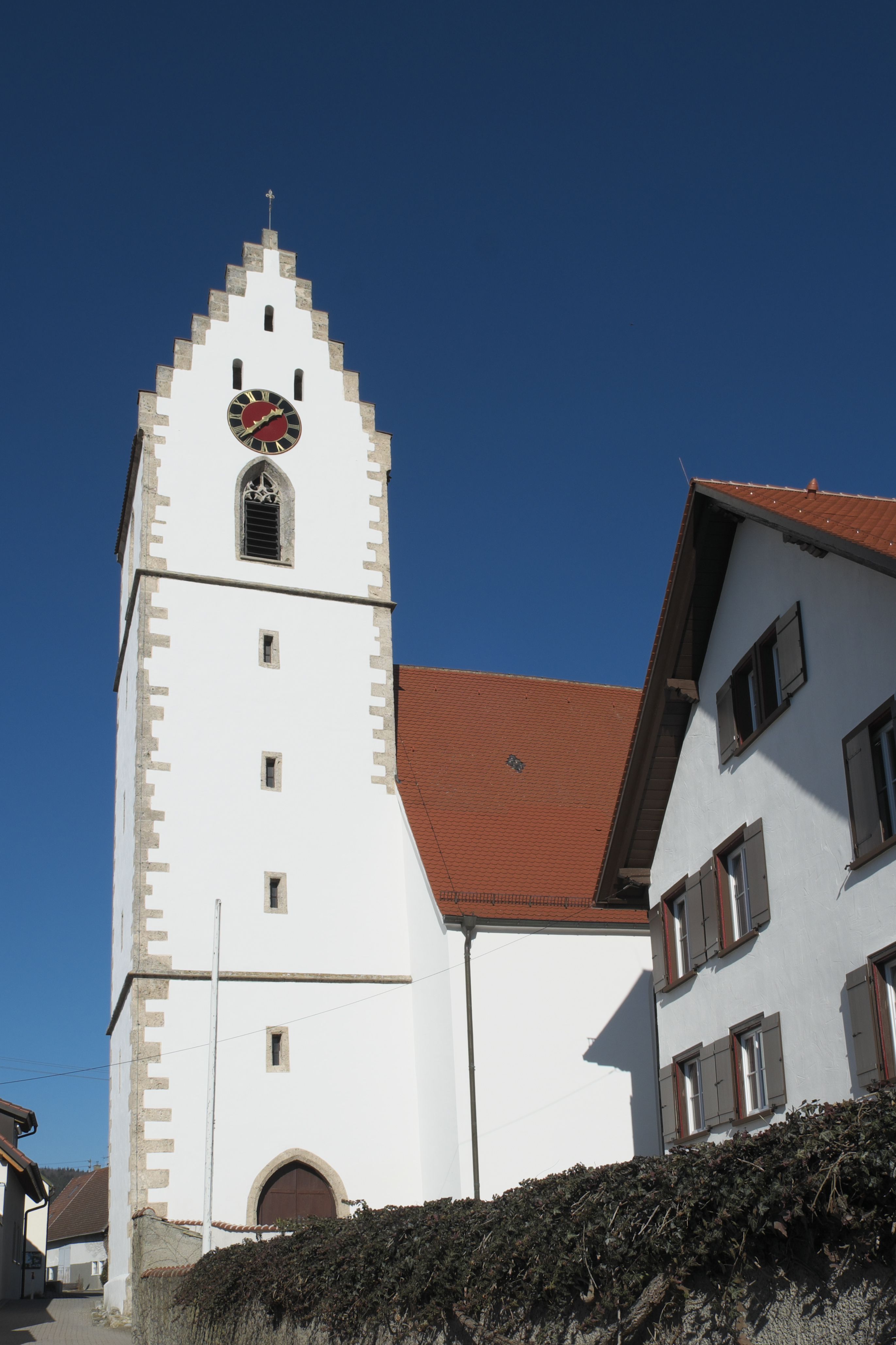 Katholische Kirche St. Cyriakus in Andelfingen (Langenenslingen) im Landkreis Biberach (Baden-Württemberg/Deutschland)